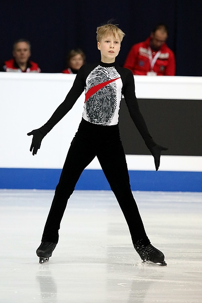 Stephen Gogolev at the Junior World Championships 2019